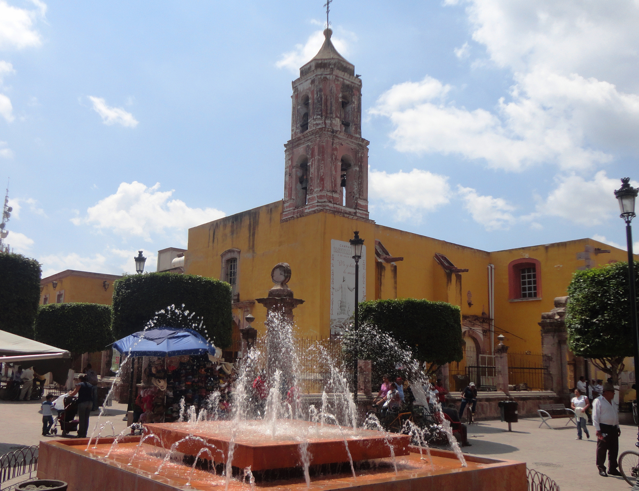 Templo de la Tercera Orden de San Francisco, Silao, Guanajuato, México.